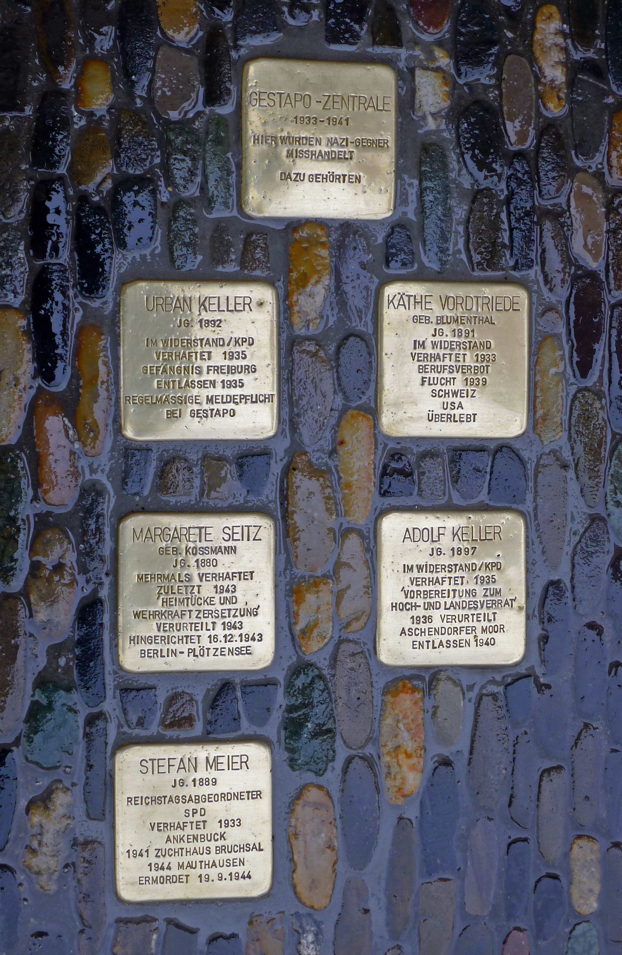 Stolpersteine vorm Basler Hof (Freiburg). Das Haus war 1933-1941 die Gestapo-Zentrale der Stadt.